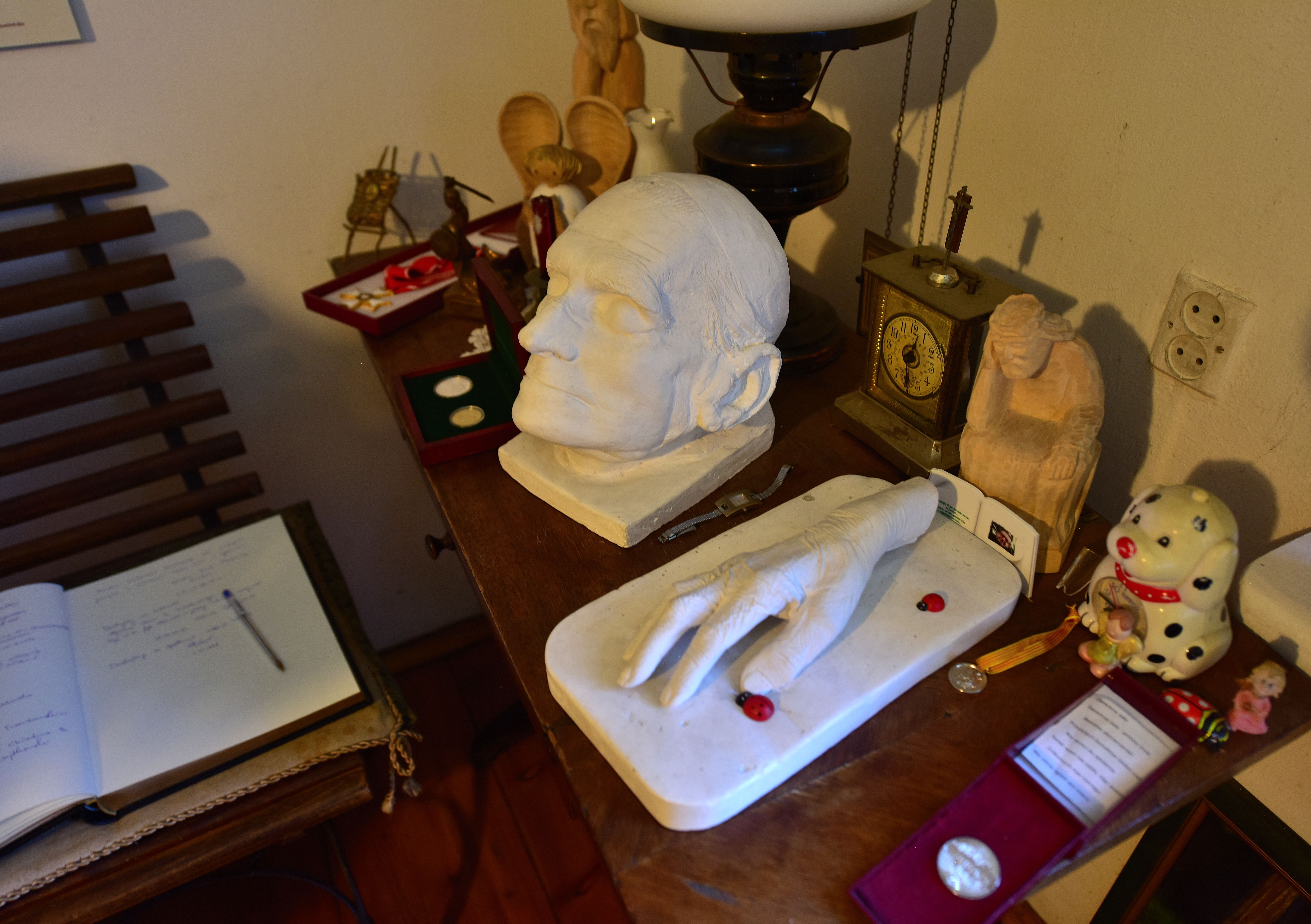 Maska pośmiertna wykonana przez warszawską artystke Joannę Bocian i odlew prawej dłoni ks Jana Twardowskiego w jego dawnym mieszkaniu przy klasztorze sióstr wizytek w Warszawie.